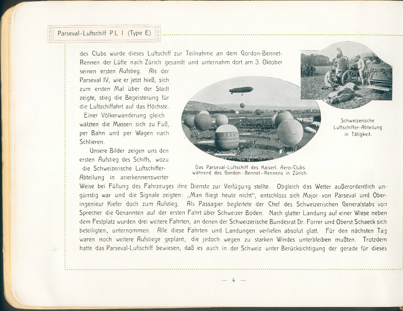 Parseval-Luftschiff PL1 beim Gordon-Bennet-Rennen in Zürich